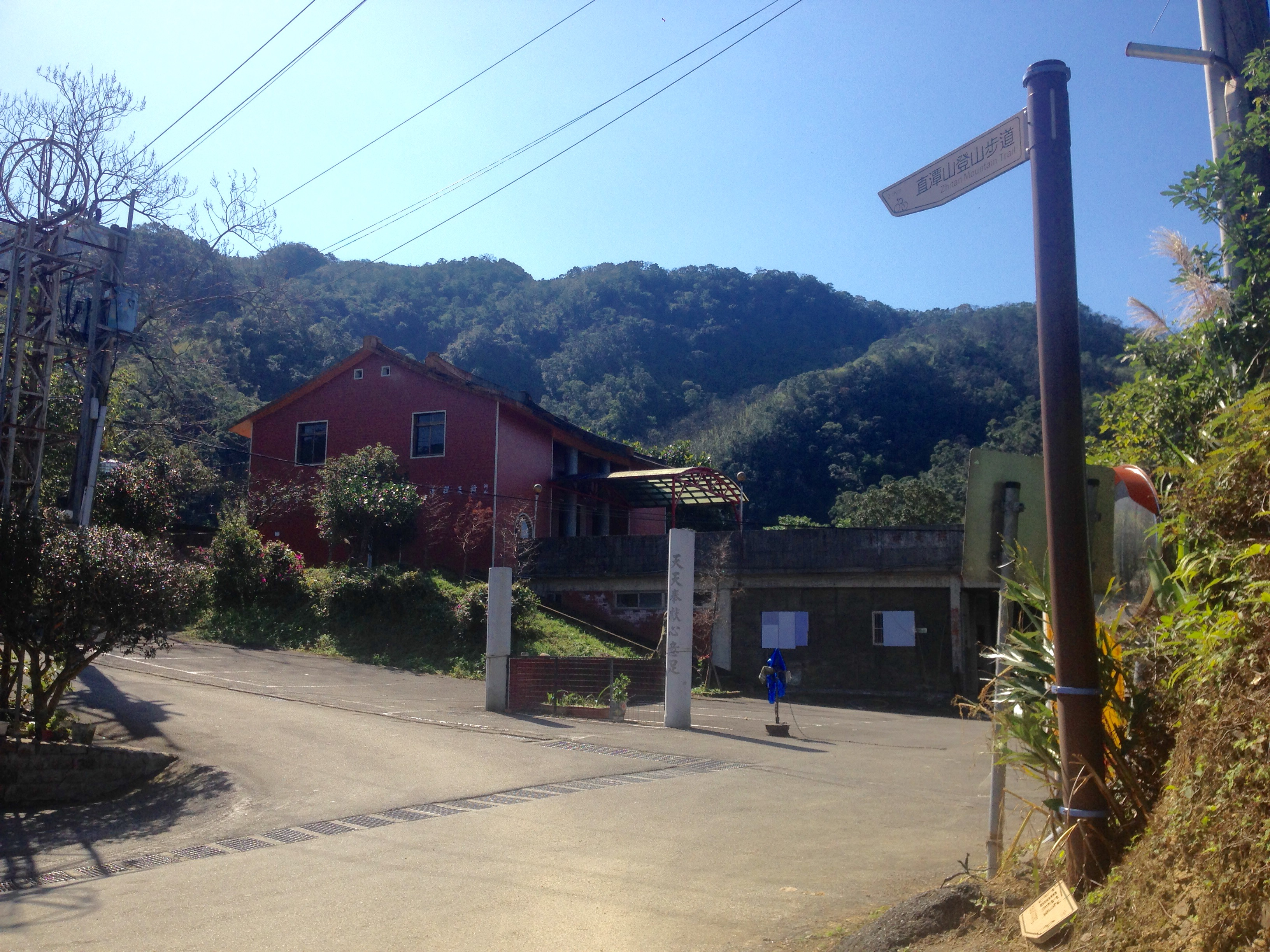 中文（台灣）: 無天禪寺入口